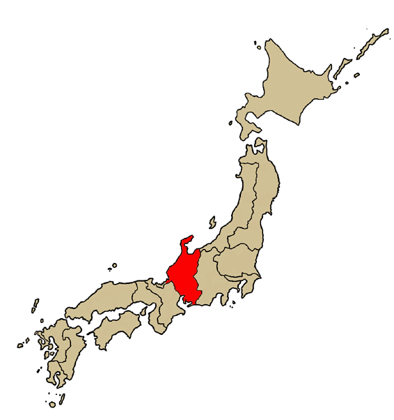 Mappa della diocesi cattolica di Nagoya, in Giappone. Lavoro personale.